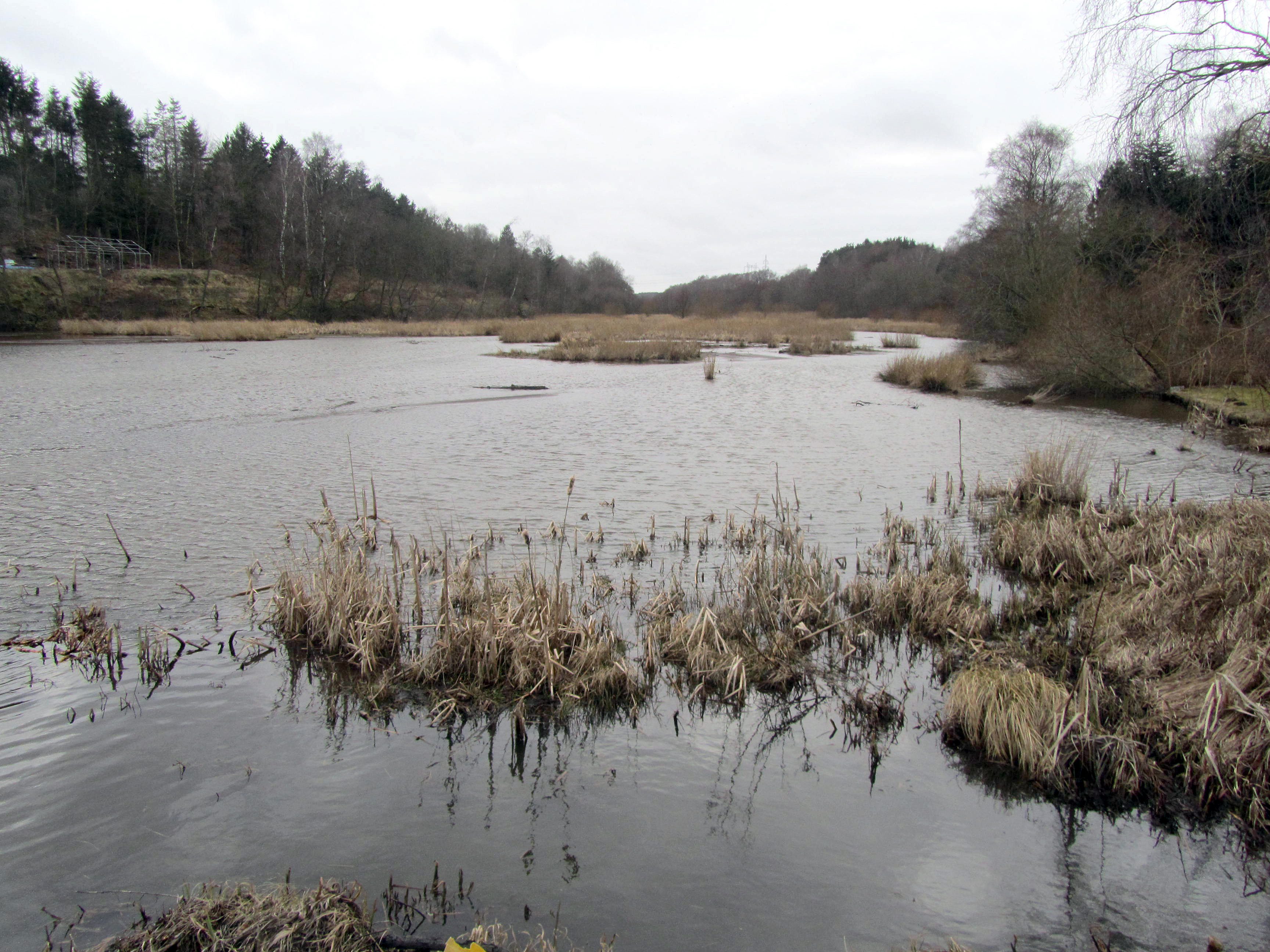 Tange Å ved udløbet til Tange Sø